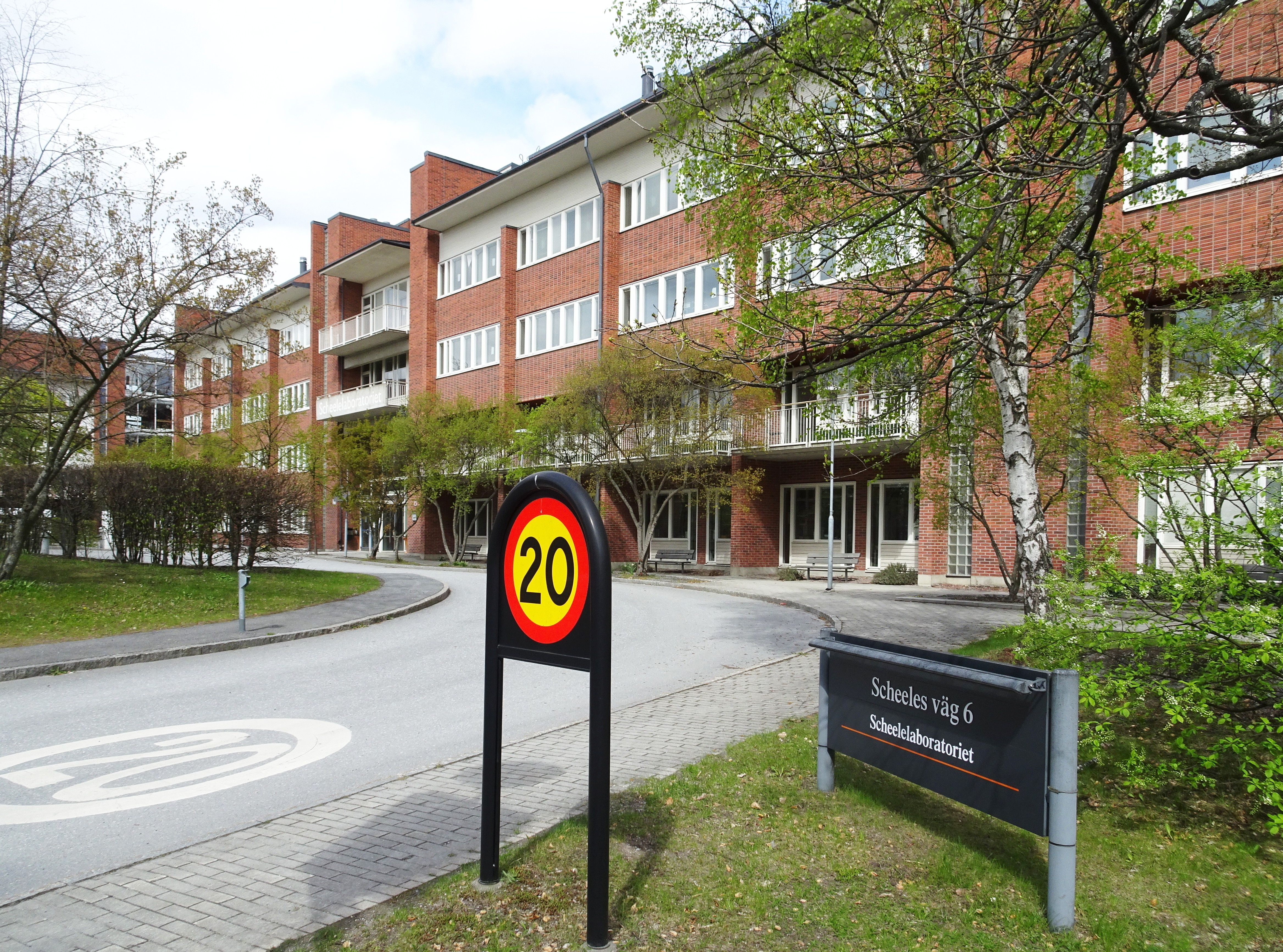 Scheelelaboratoriet, Campus Solna, byggår 1997, arkitekt Bjurström & Brodin